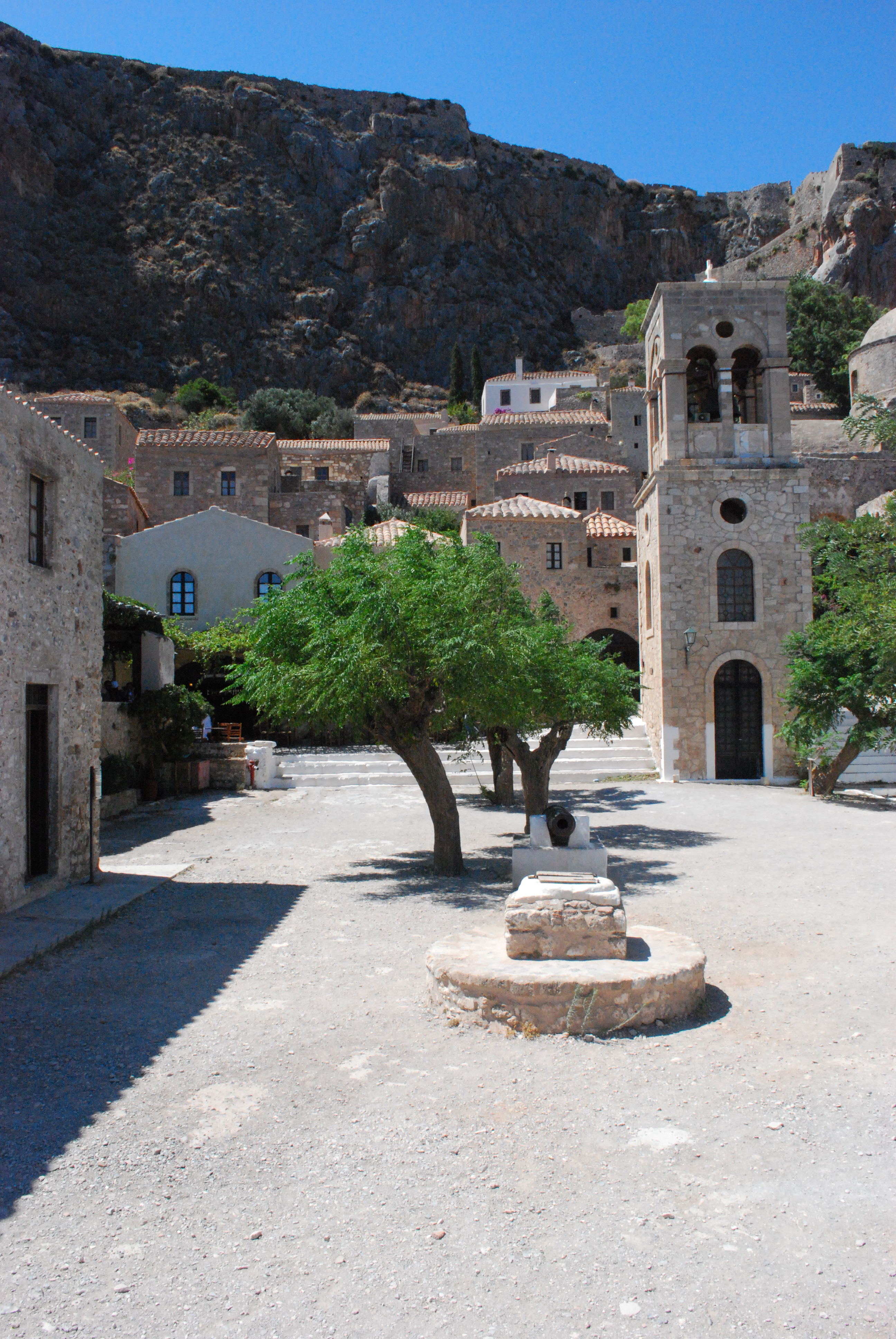 Vue de Monemvassia.